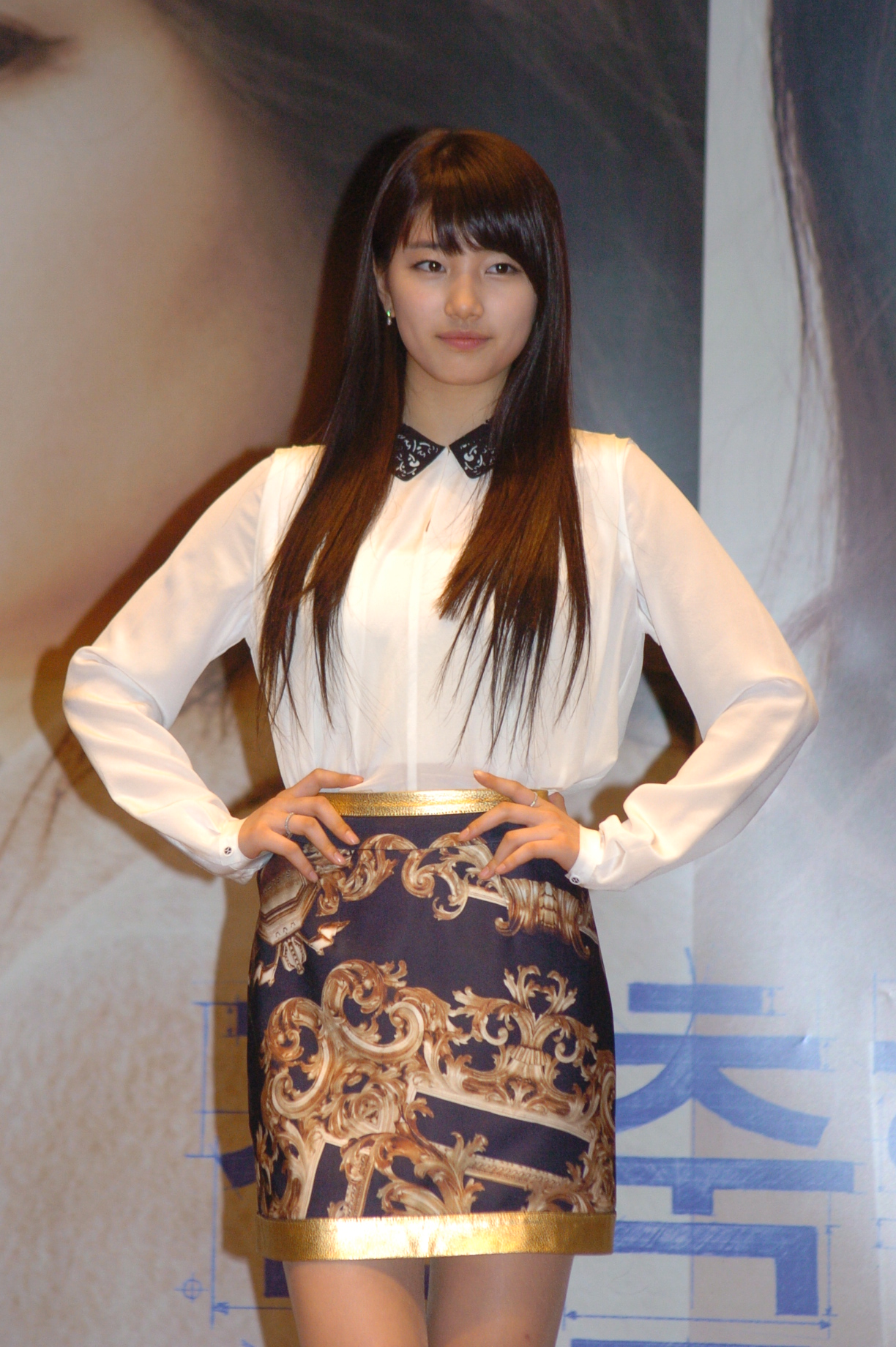 2012년 2월 13일 열린 《건축학개론》 제작보고회에 참석한 수지.